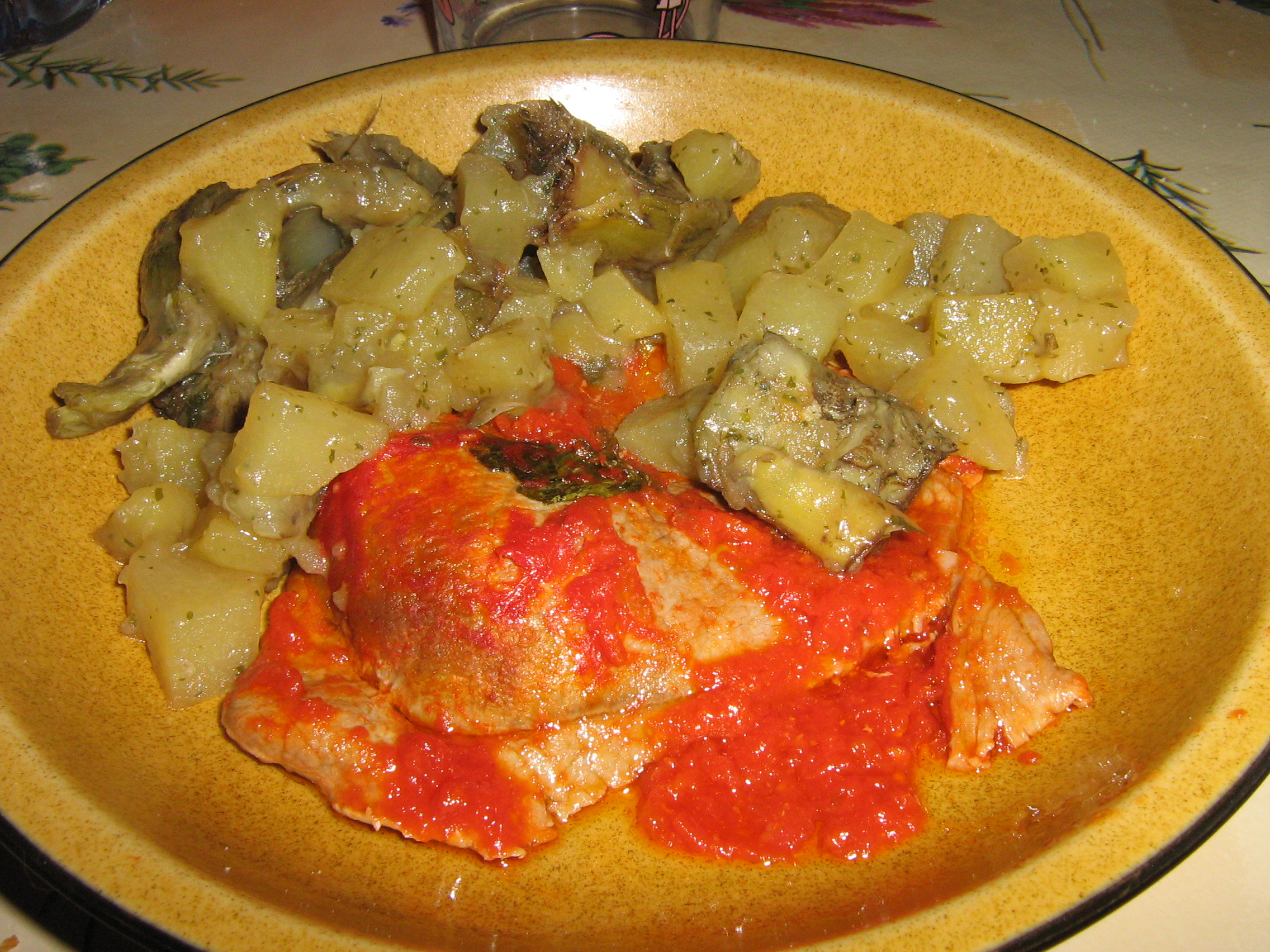 Secondi